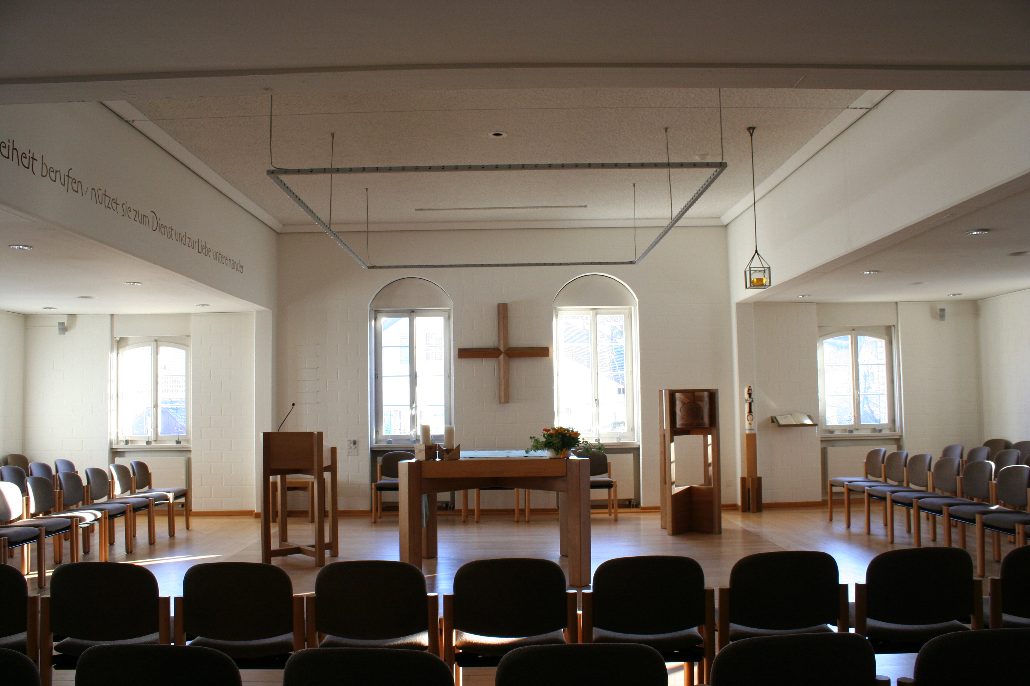 Römisch-katholische Kirche Johannes XXIII. in der Limi Greifensee, Gestaltung von Primo Lorenzetti